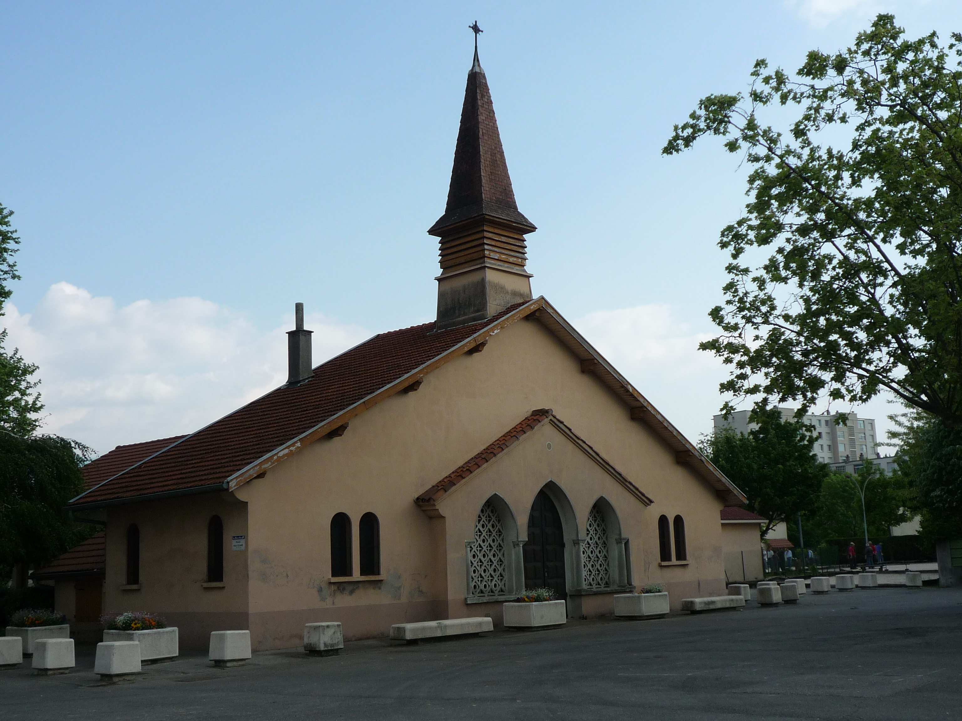 La chapelle Saint-Maurice à Saint-Martin-d'Hères.